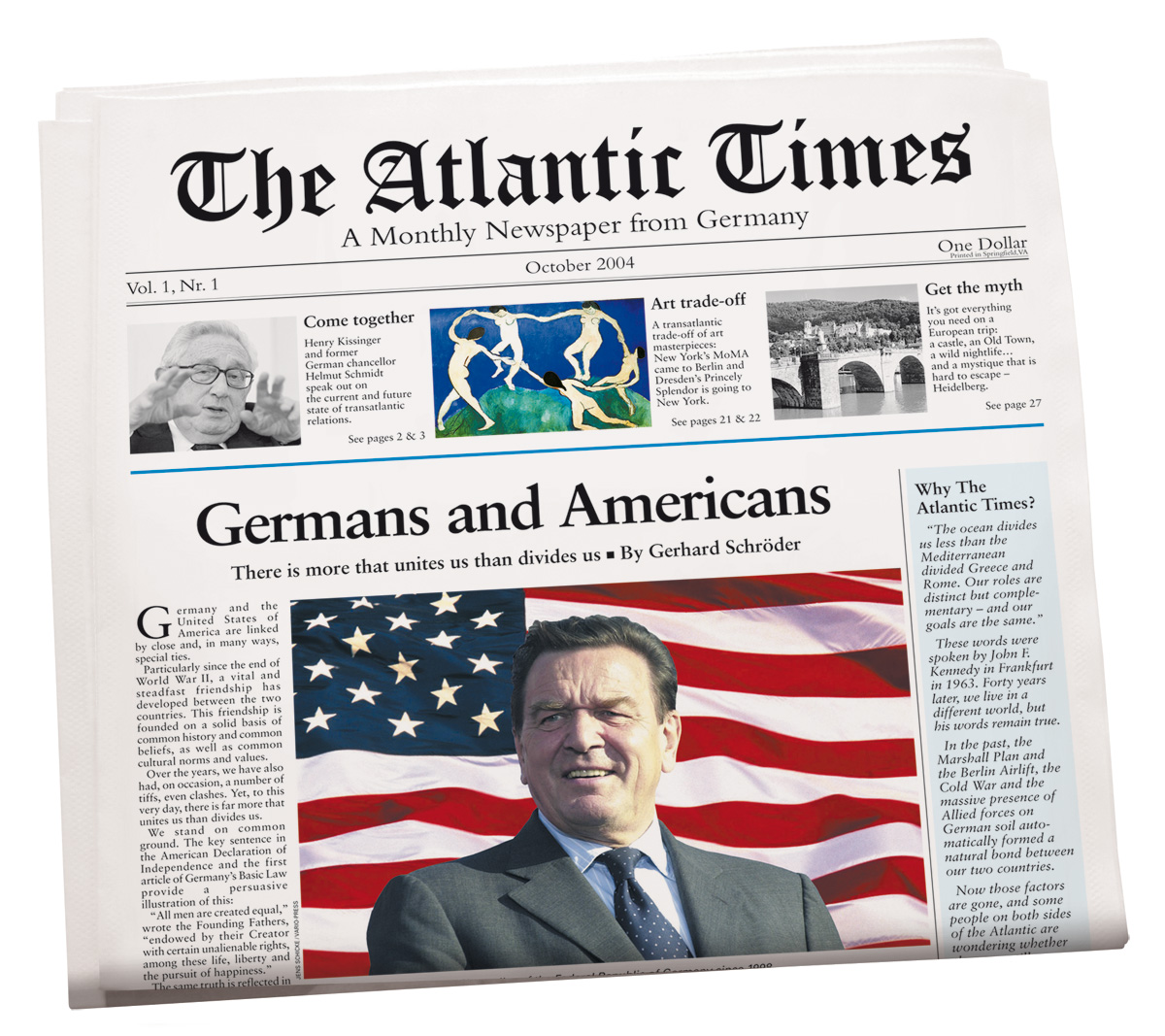 Faksimile des Titelbildes von The Atlantic Times, Ausgabe Oktober 2004